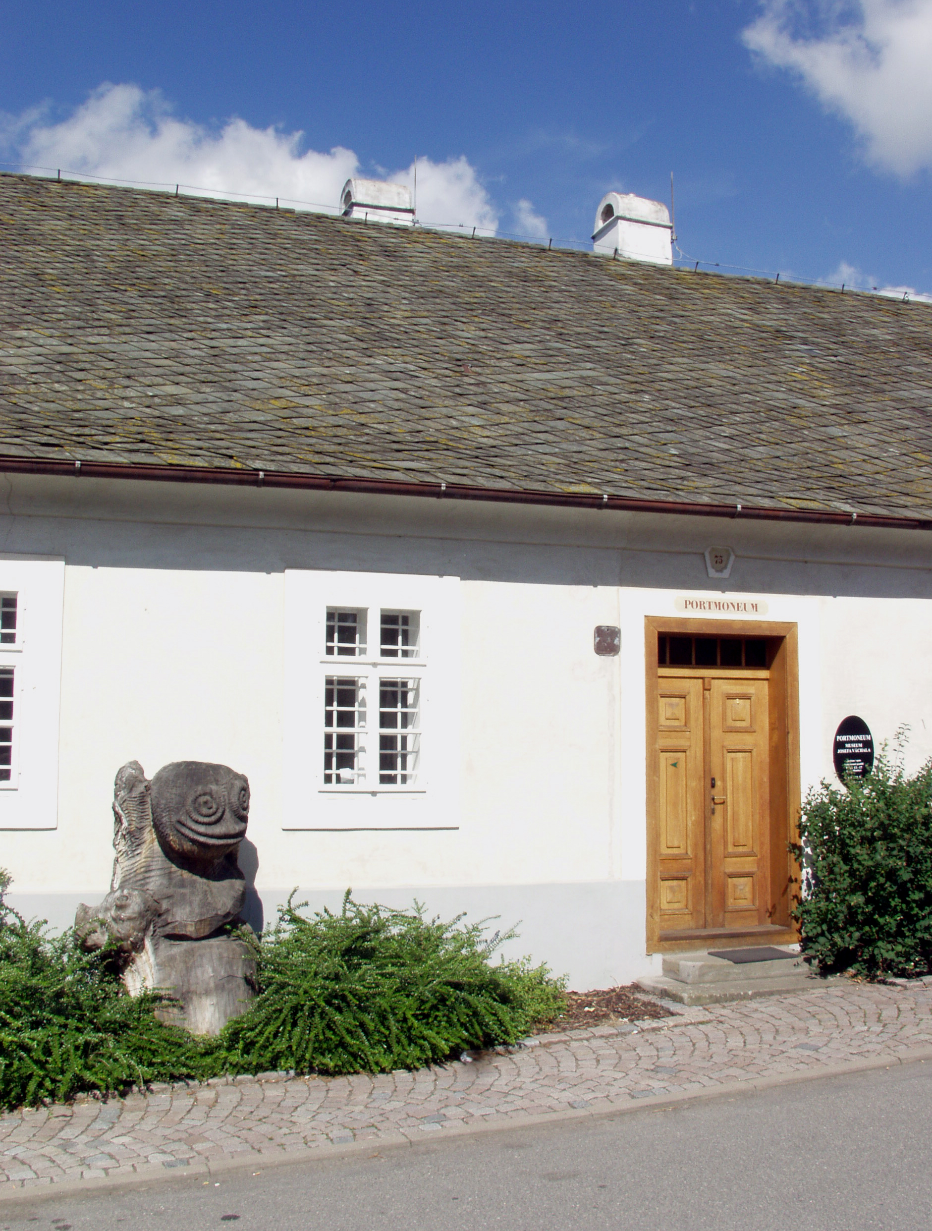 Litomyšl, Portmoneum - Muzeum Josefa Váchala